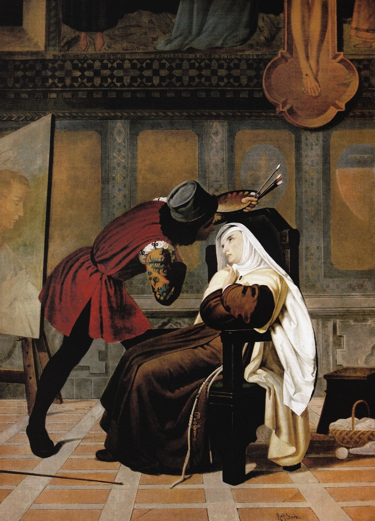 Raffaello Sorbi, Dichiarazione che fa Filippo Lippi alla signora Buti nobile fiorentina, oil on canvasmedium QS:P186,Q296955;P186,Q12321255,P518,Q861259, Height: 98 cm (38.5 ″); Width: 71 cm (27.9 ″) dimensions QS:P2048,98U174728;P2049,71U174728, Banca Popolare di Milano.